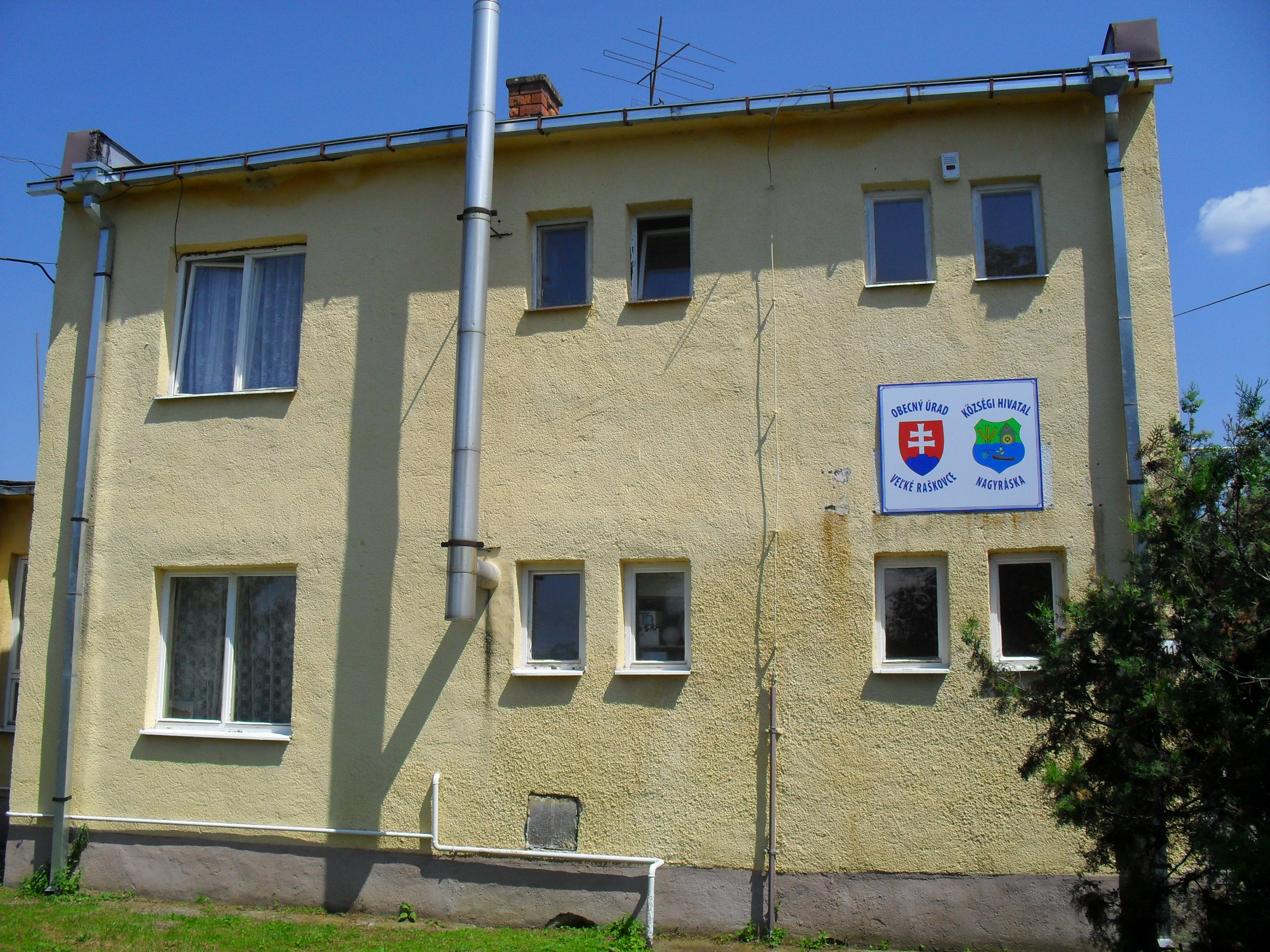 Nagyráska - községi hivatal